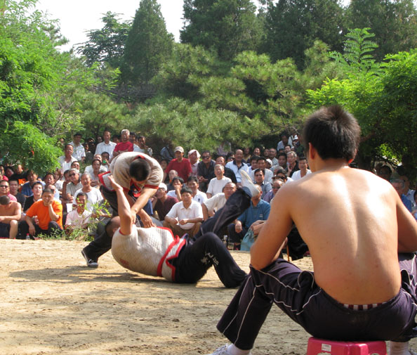 津门摔跤